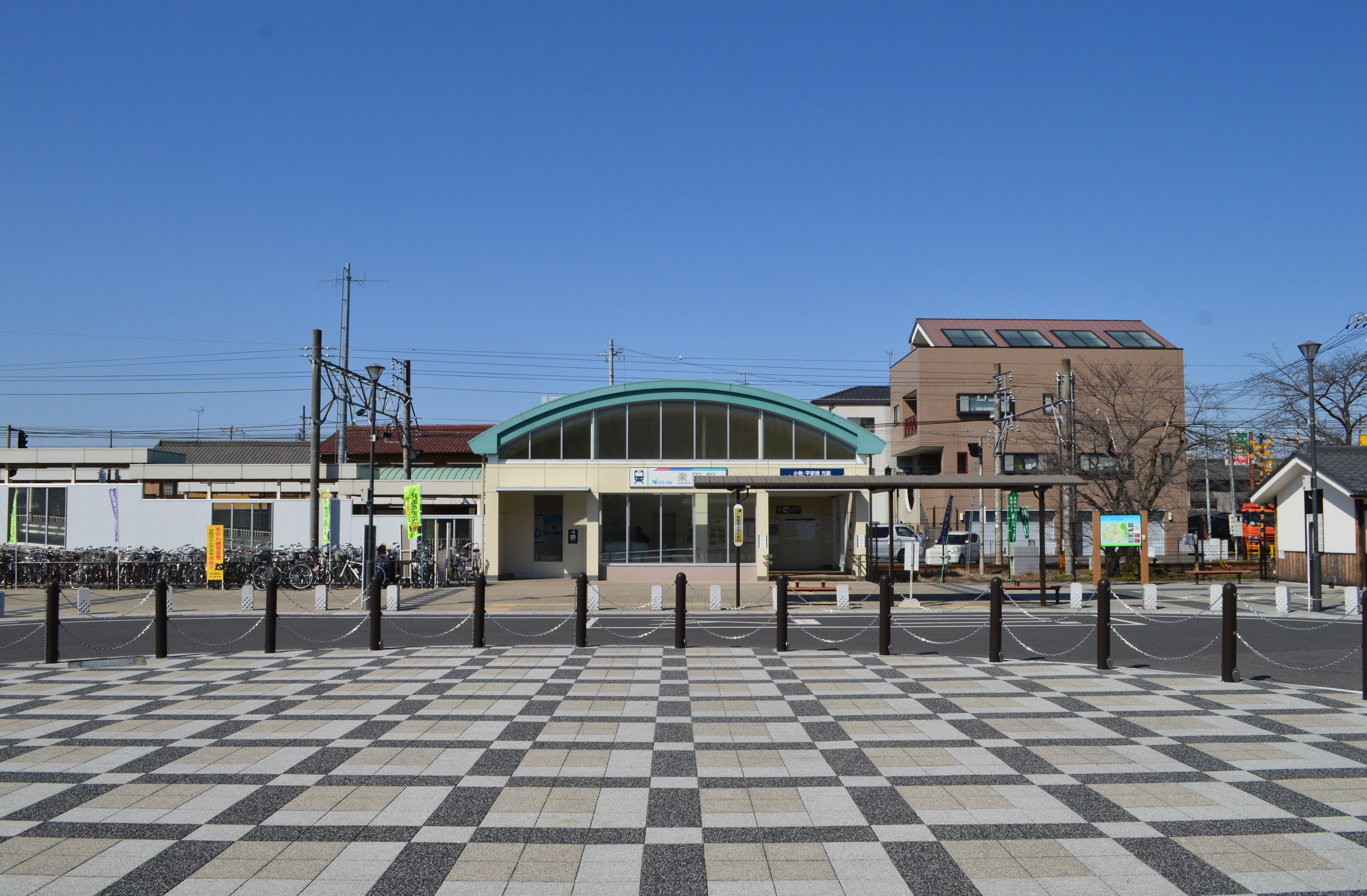 楽田駅 駅舎